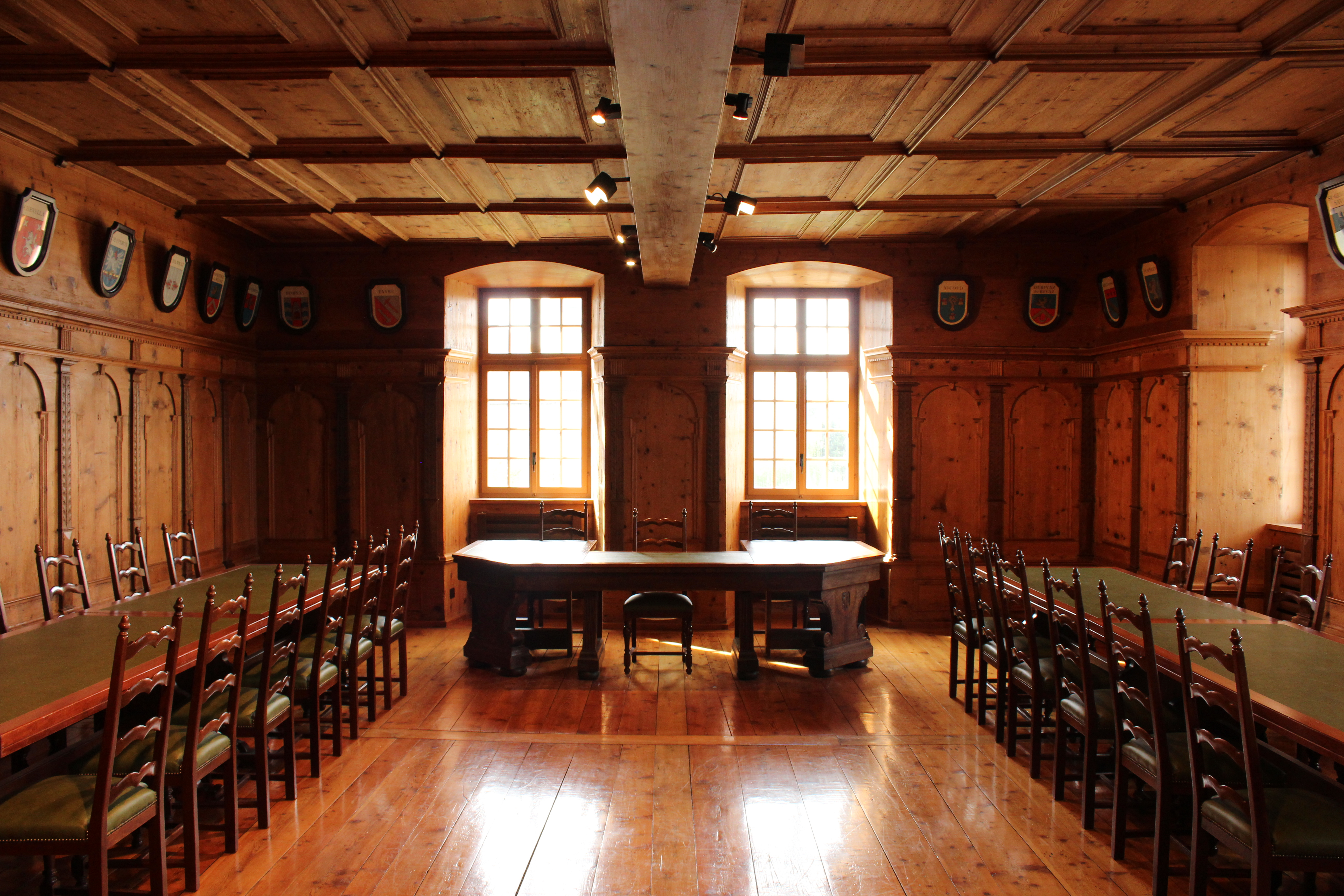 Salle aux menuiseries en sapin et épicéa aménagée en 1655.